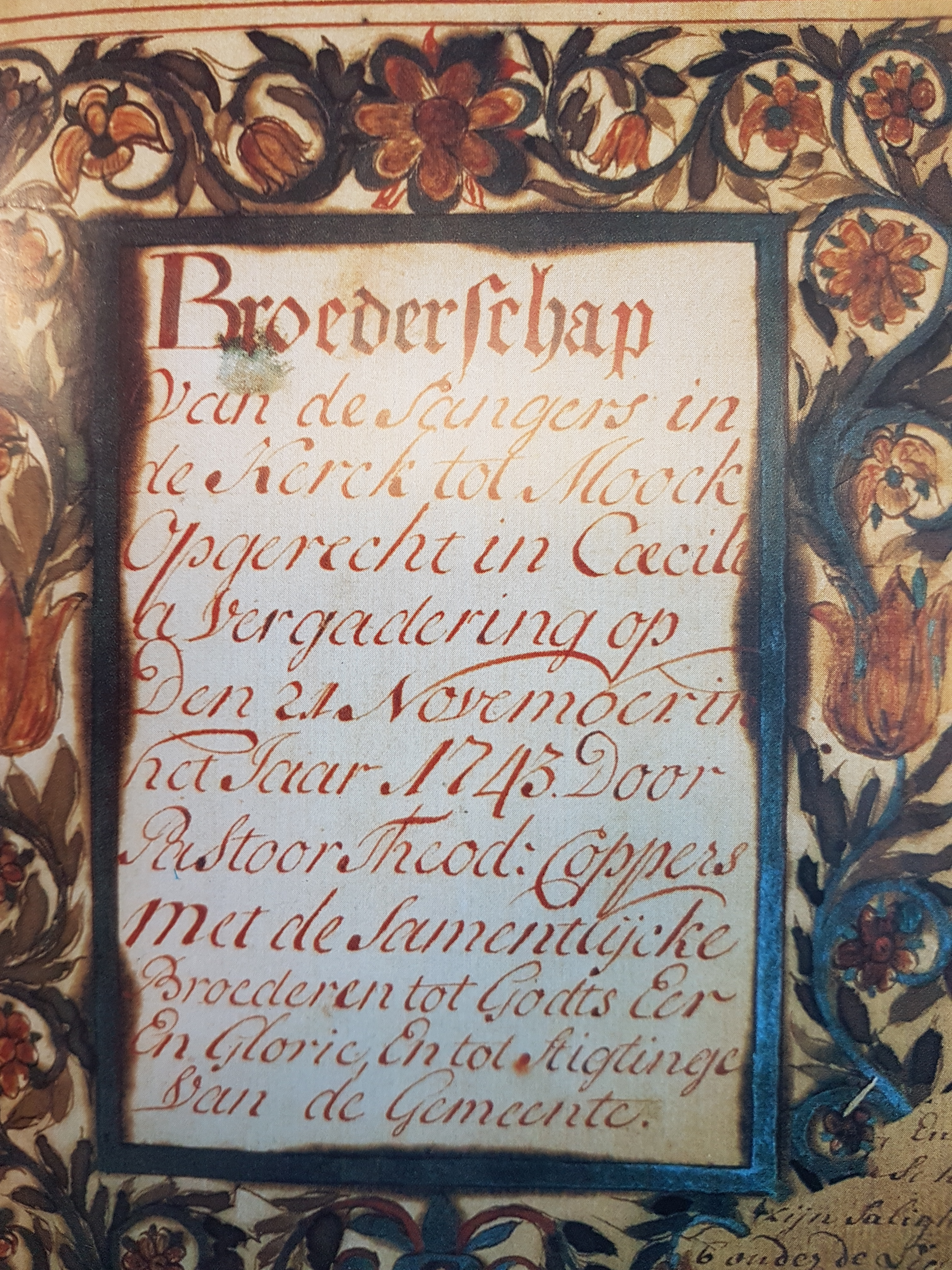 Originele akte van oprichting oudste mannenkoor van Nederland, sinds 1743